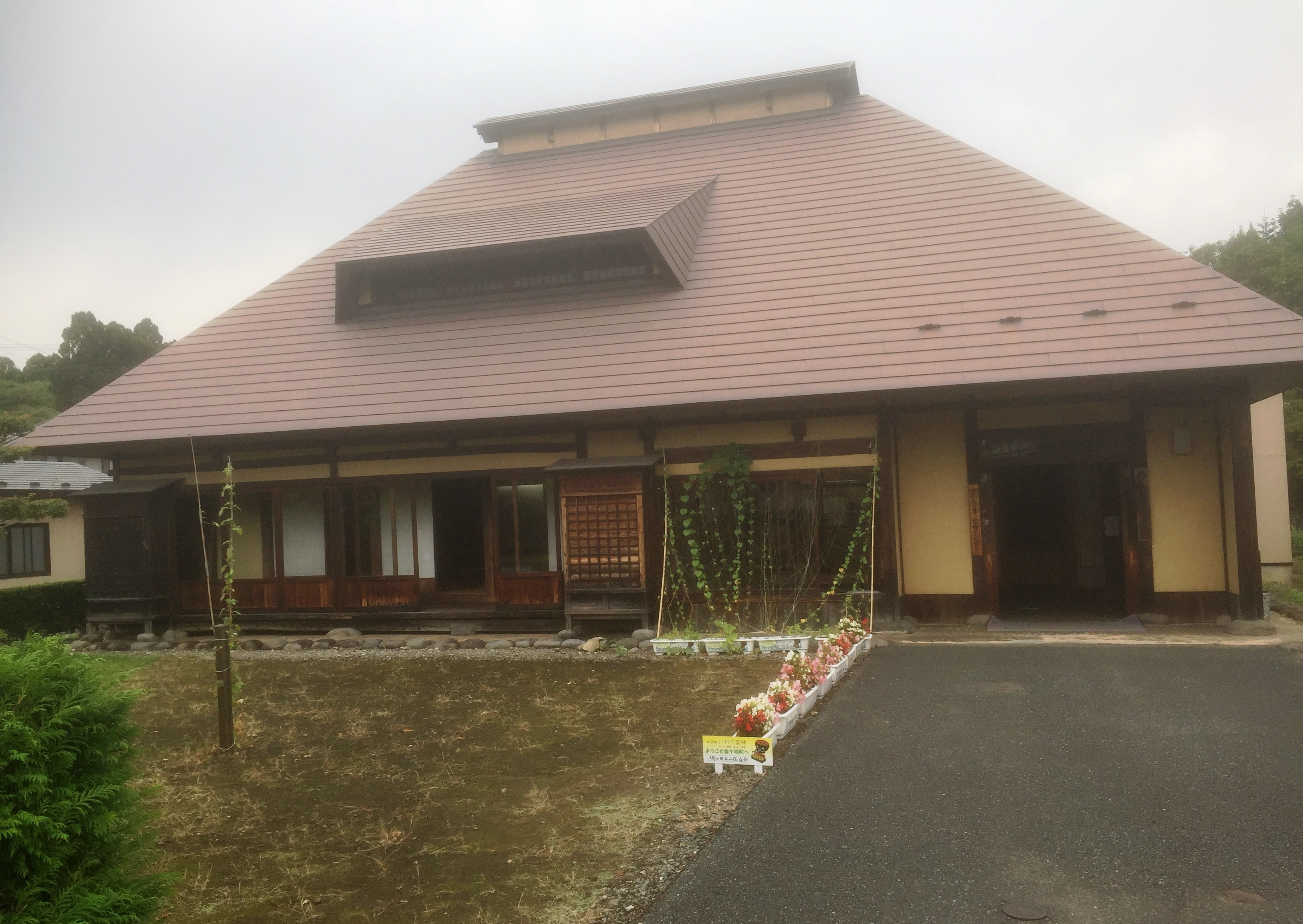 白糸まちなみ交流館。岩手県金ケ崎町。